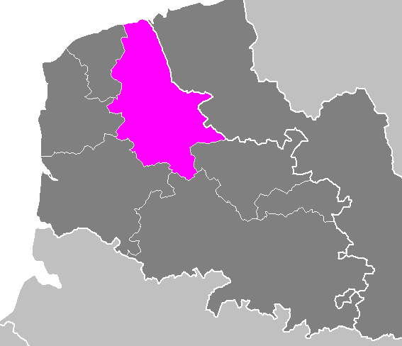 Arrondissement_de Saint-Omer